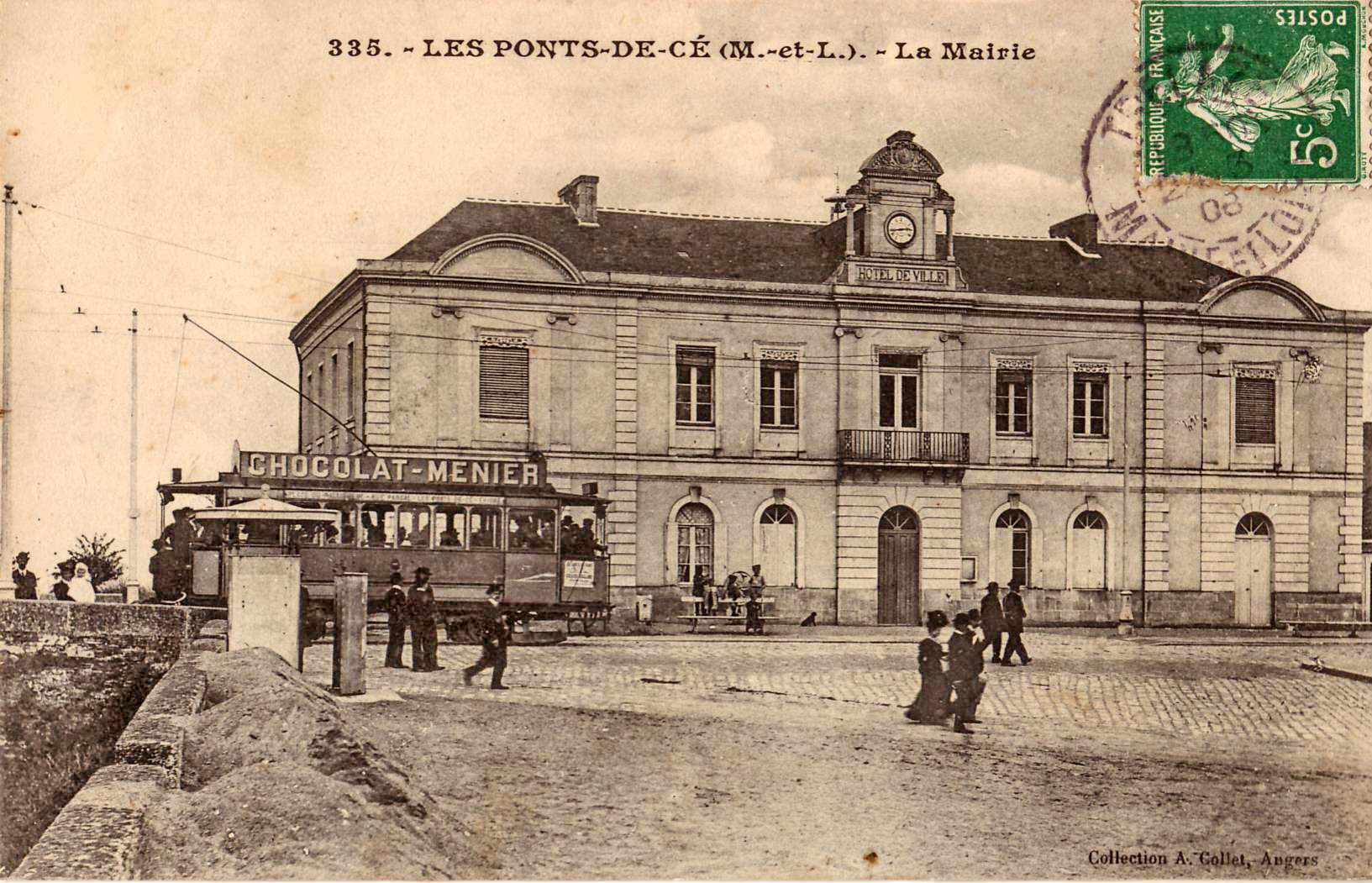 Carte postale ancienne éditée par A. Collet à Angers, n°335 : LES-PONTS-DE-CÉ